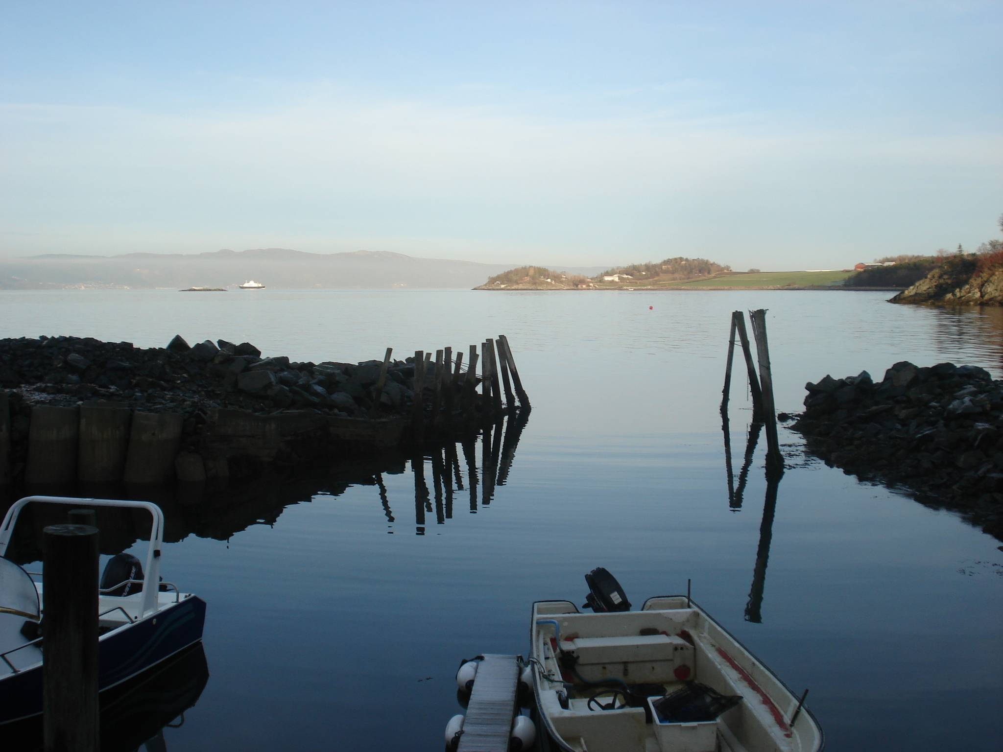 Flakk på Byneset